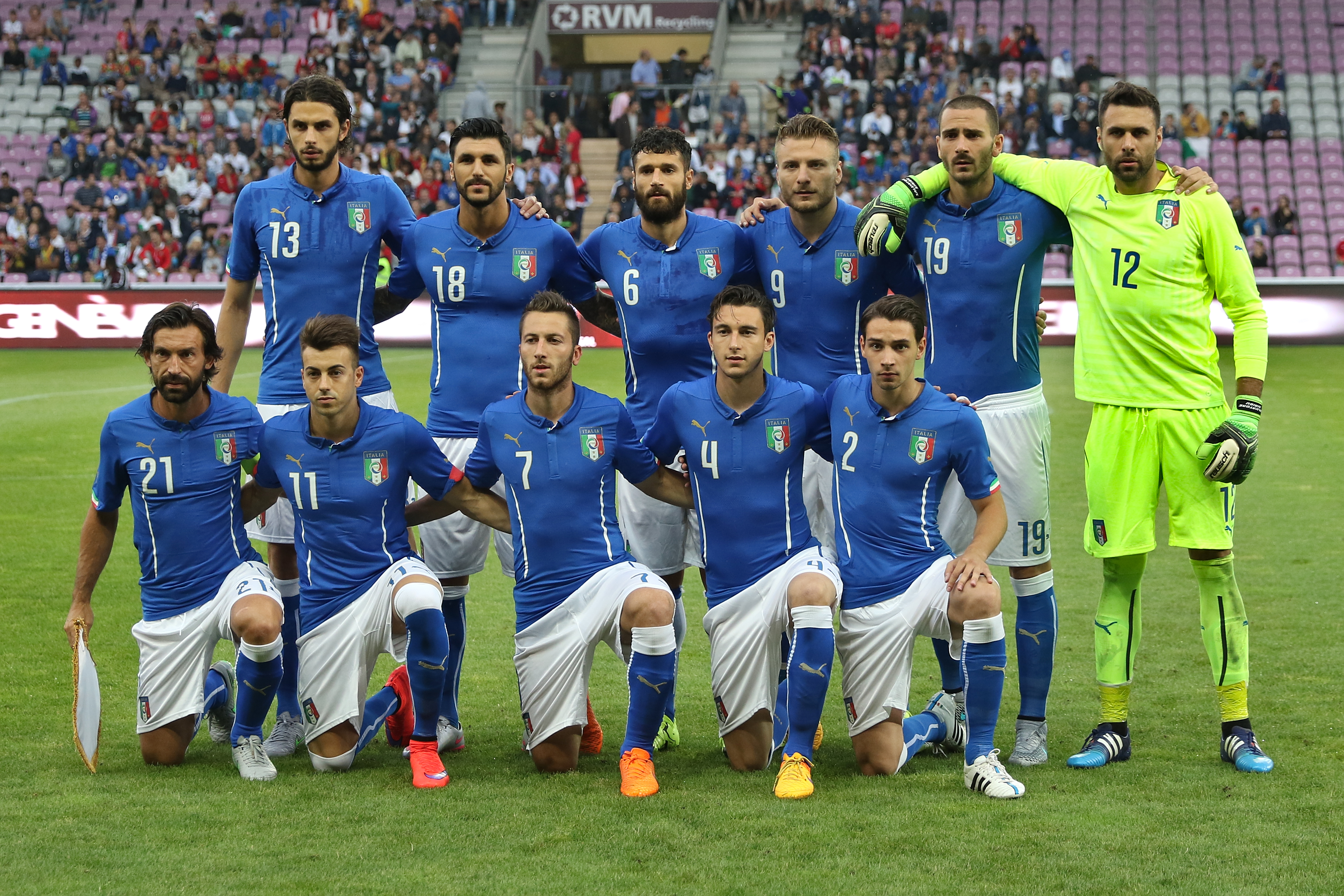 20150616 - Portugal - Italie - Genève - Equipe d'Italie